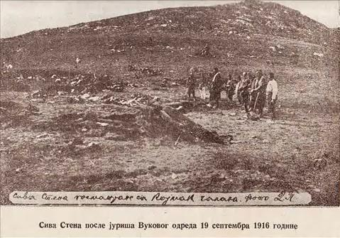 Serbian commander Vojin Popović's detachment in Siva Stena, 1916